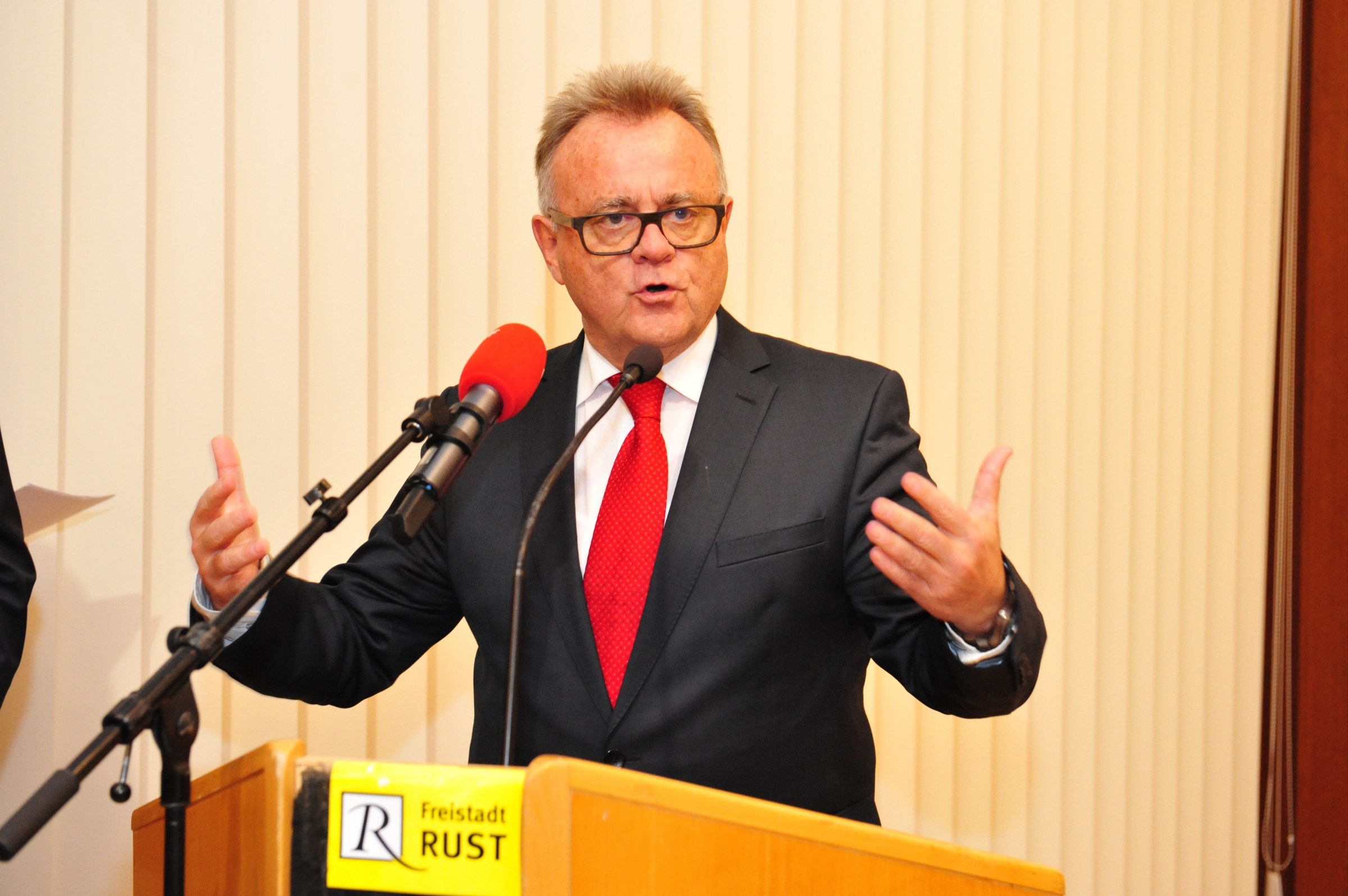 Landeshauptmann Hans Niessl bei seiner Ansprache zur Ökumenischen Begegnung am 8. November